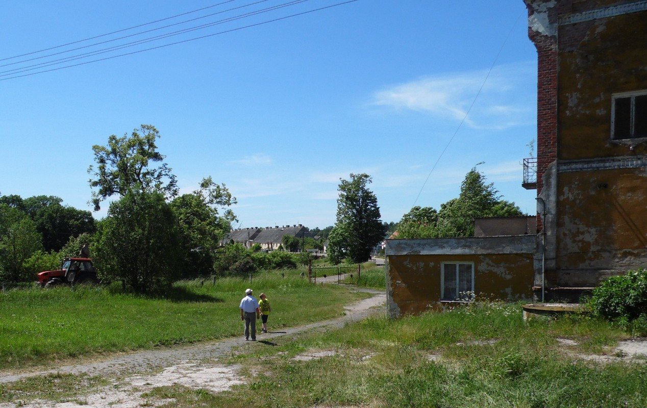 WIDOK NA BRZEŹNICĘ.